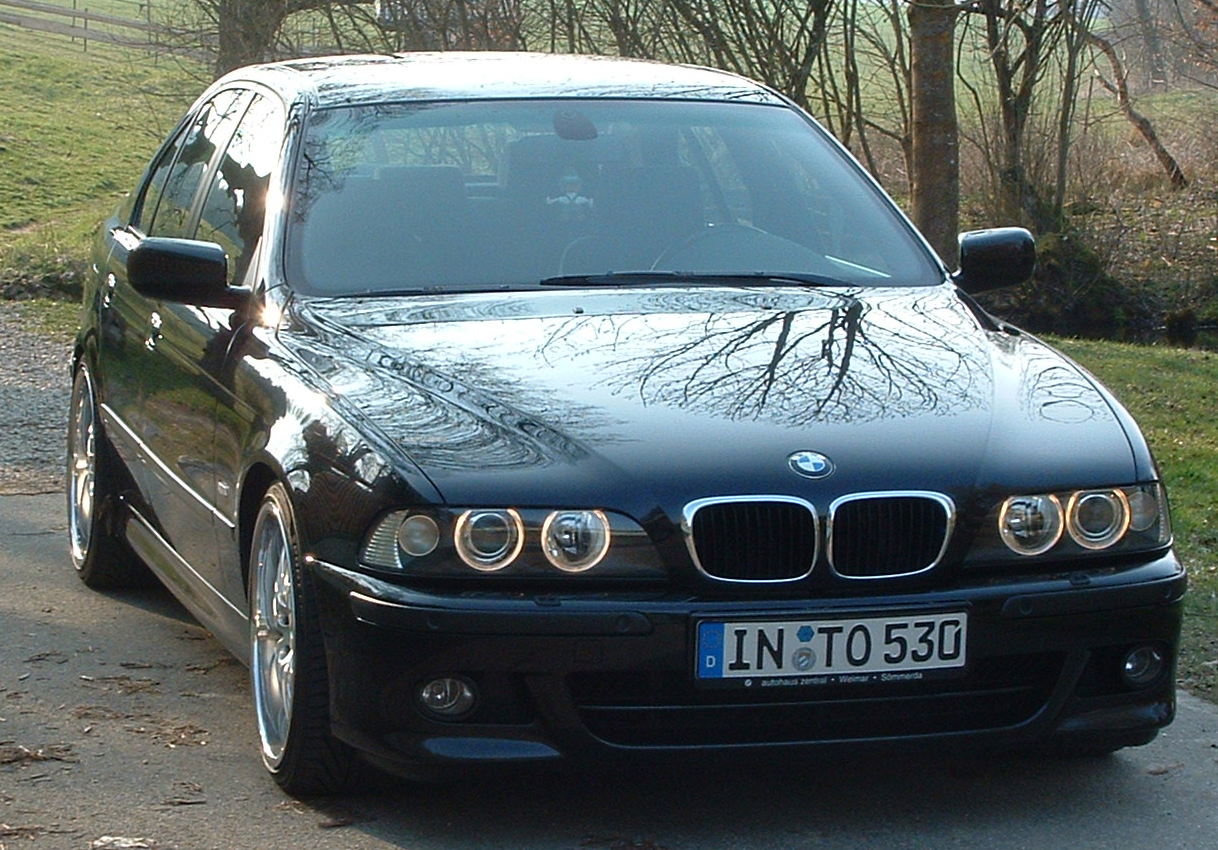 BMW E39 530i